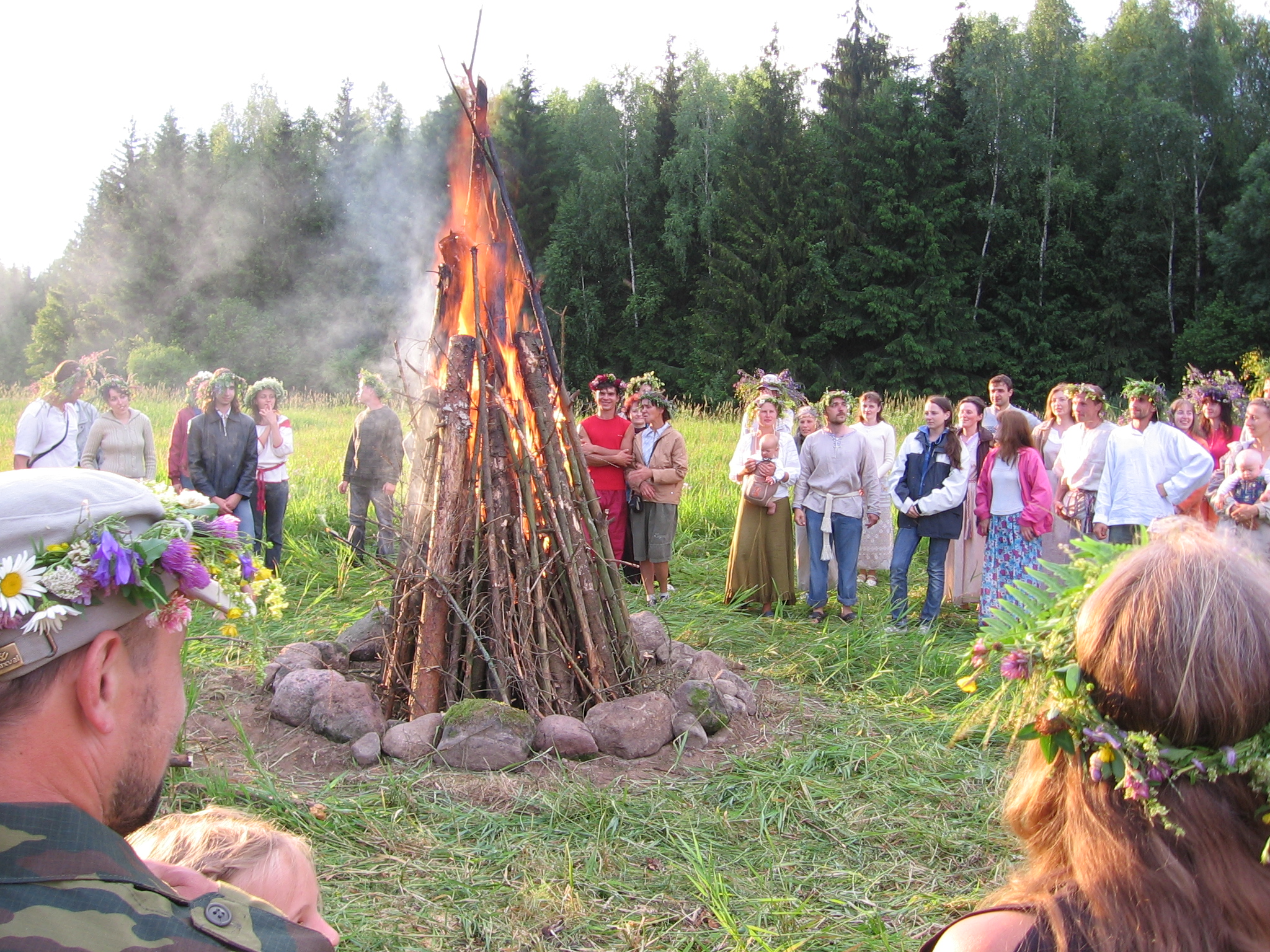 Купальский костёр. Беларусь, 21 июня 2008 года